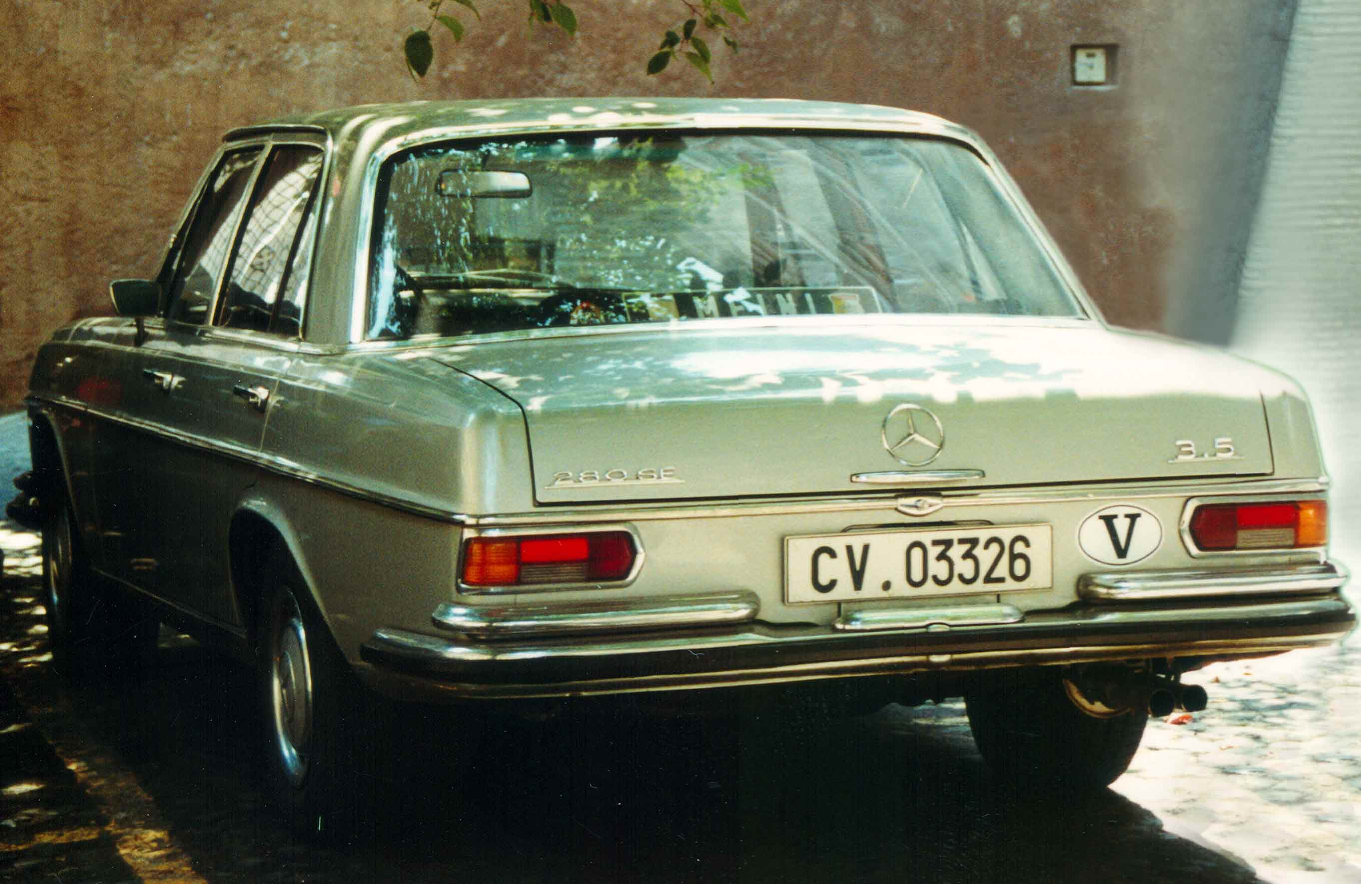 Privatfahrzeug Schweizer Garde, Beispiel für das seltene Nationalitätskennzeichen V